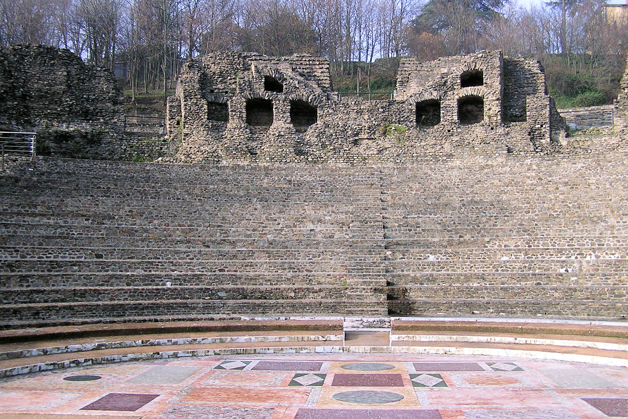 Odéon antique de Lyon. Premier plan : orchestra et dallage en opus sectile. Plan intermediaire : gradins de la prima cavea. Arrière plan : mur de soutien de la cavea, vestiges de rampes d'escalier